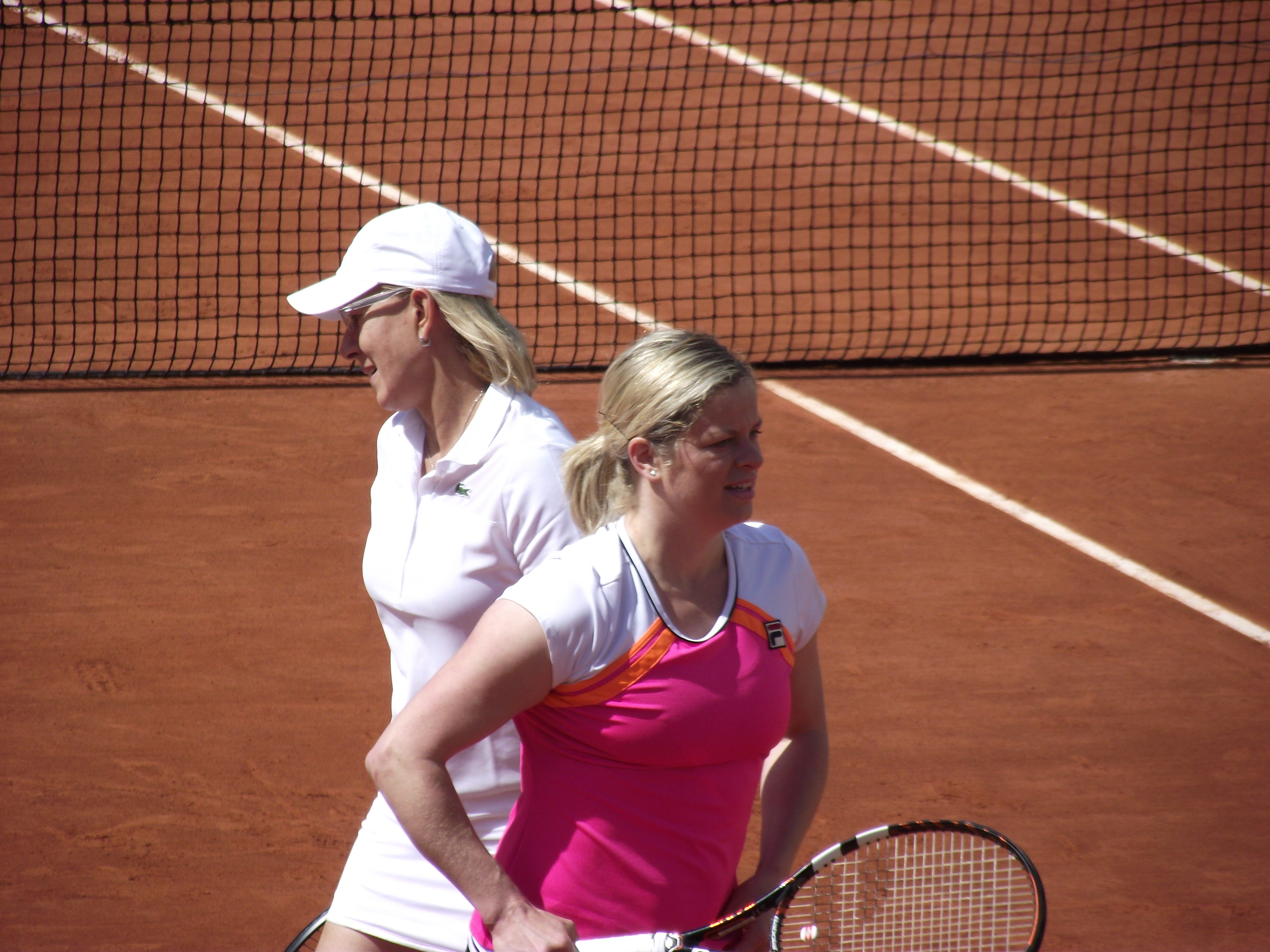 Belgian Kim Clijsters & American Martina Navratilova partnering at 2014 French Open Legends event. 2014 Roland Garros, Paris, France.